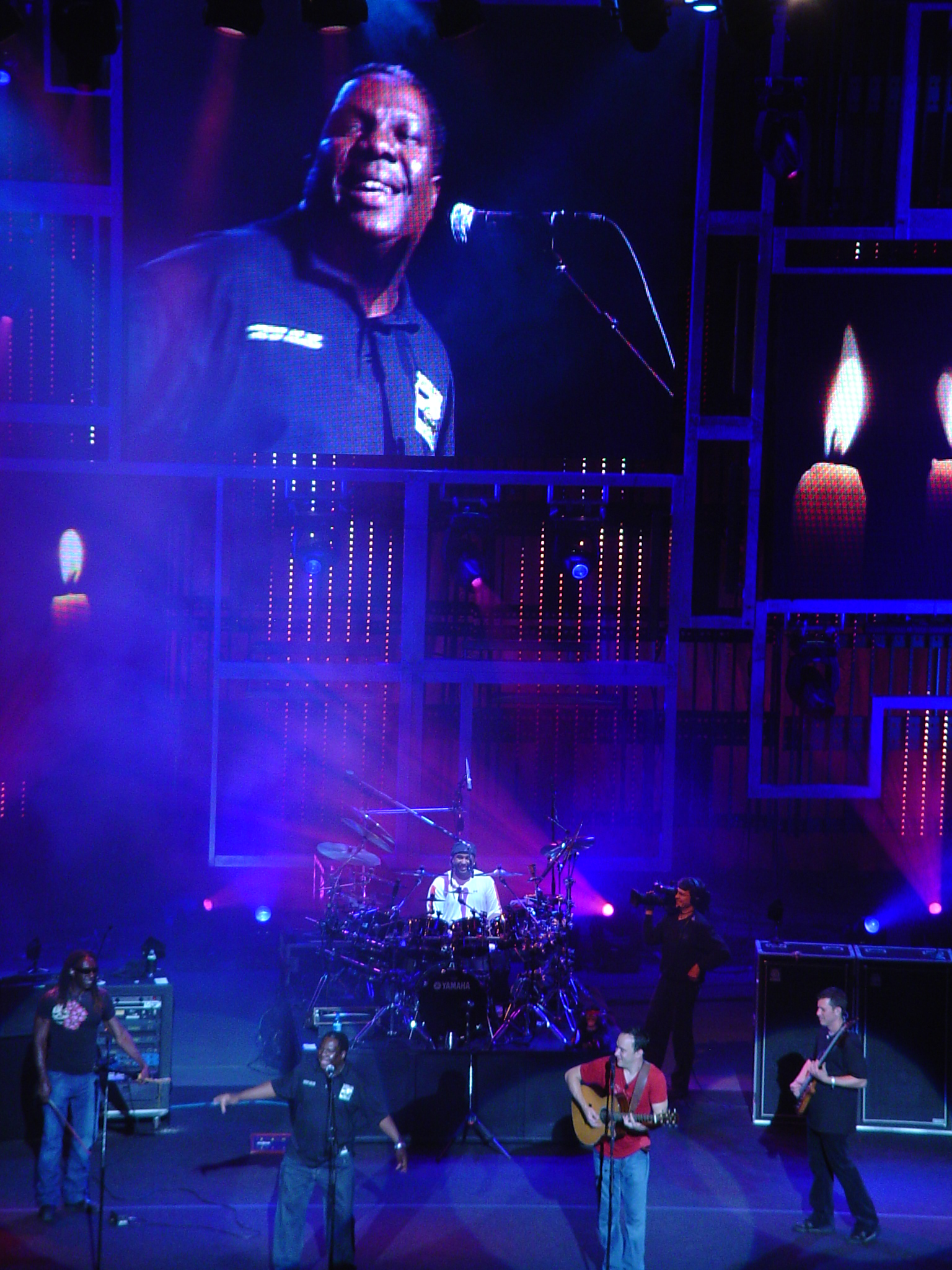 Special guest: Vusi Mahlasela